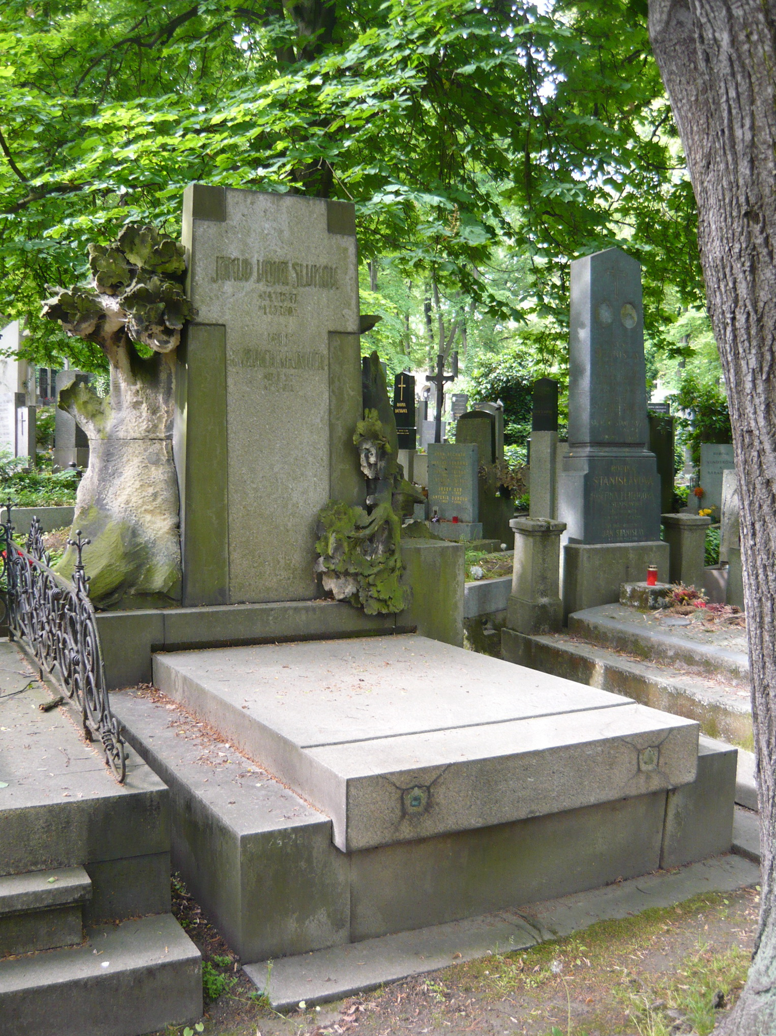 Hrobka herce Vojty Slukova (1847-1903), 1903, Praha, Olšanské hřbitovy, hřbitov VI, oddělení 10b, hrob 26